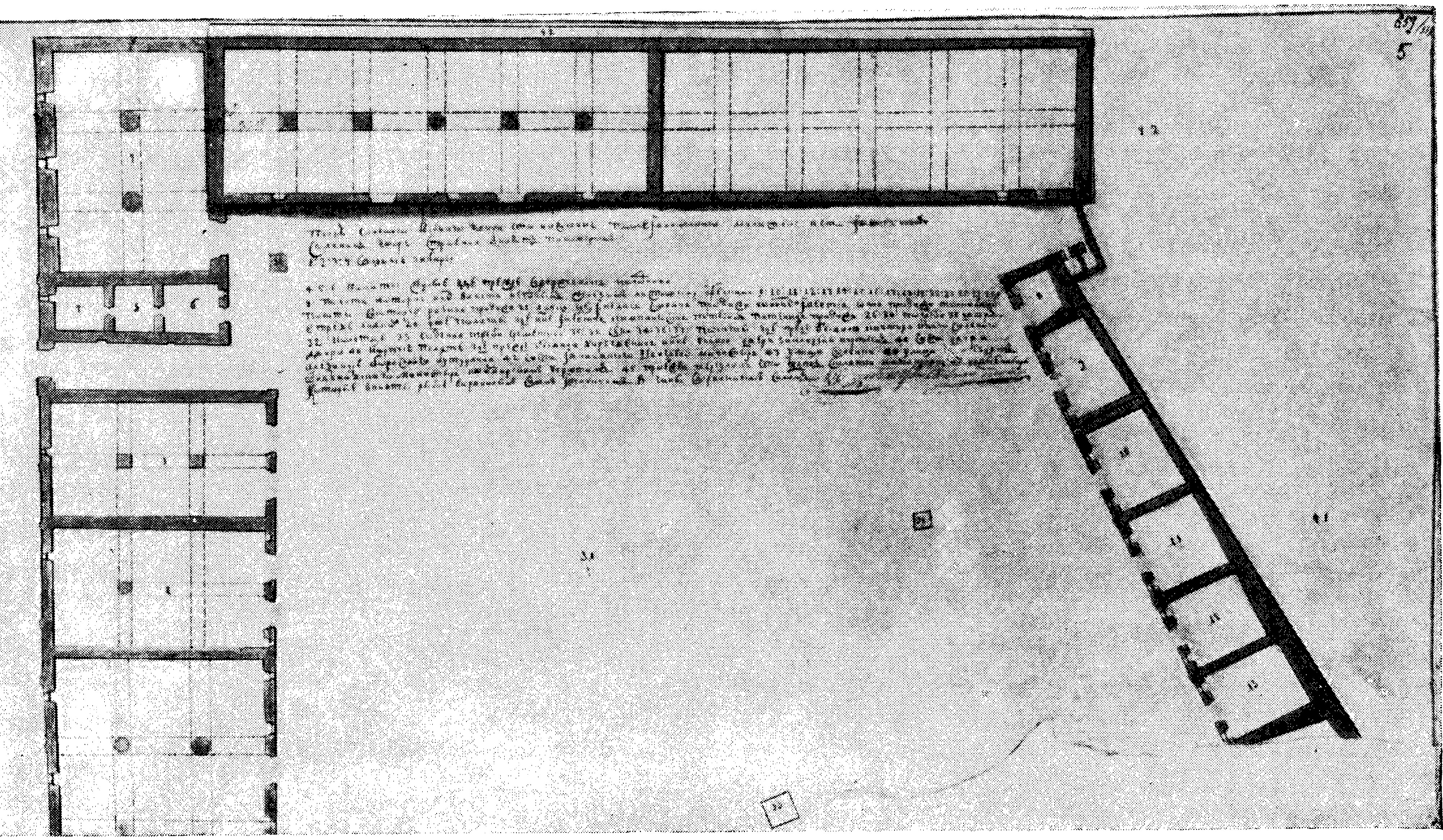 Проект перестройки Соляного рыбного двора (на Солянке) около Ивановского монастыря в Москве в Белом городе. Из книги: А. Михайлов. Архитектор Д. В. Ухтомский и его школа. Государственное издательство по строительству и архитектуре. М.: 1954. С. 381. Тир. 7000 экз. стр. 56